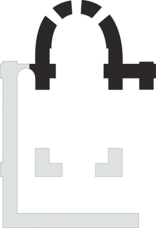 План церкви за М. Константиновичем. Кінець ХІХ ст. Чорним позначено збережені стіни, сірим – підмурки, на яких стіни не збереглися.